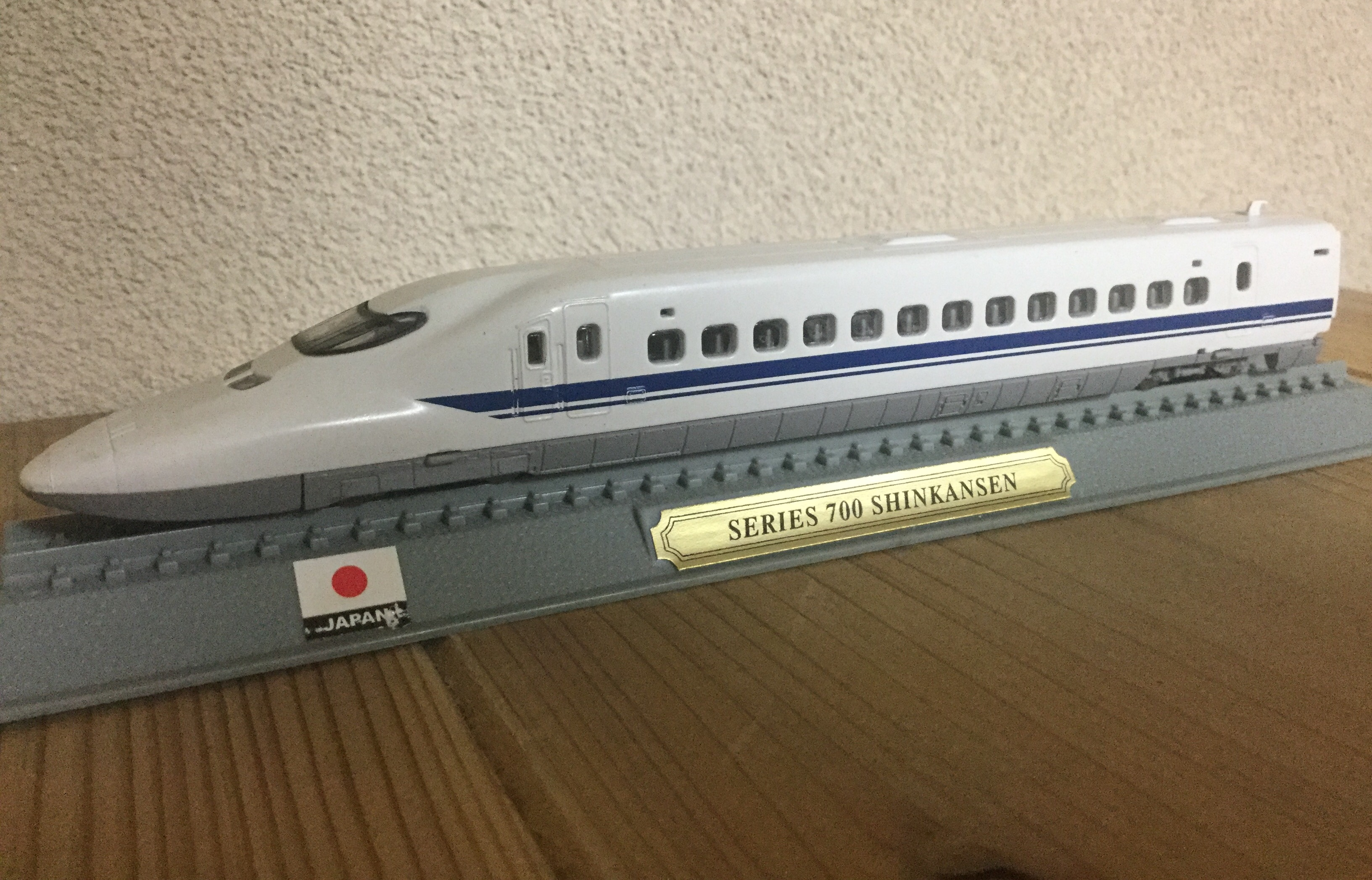 700系新幹線のモデル。